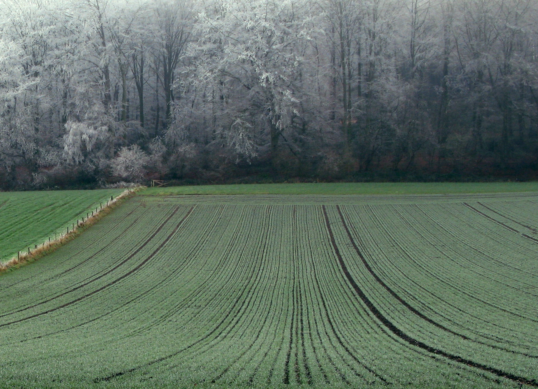 Wintergetreide-Acker, Vaalserquartier (Aachen, Grenze zu den Niederlanden)